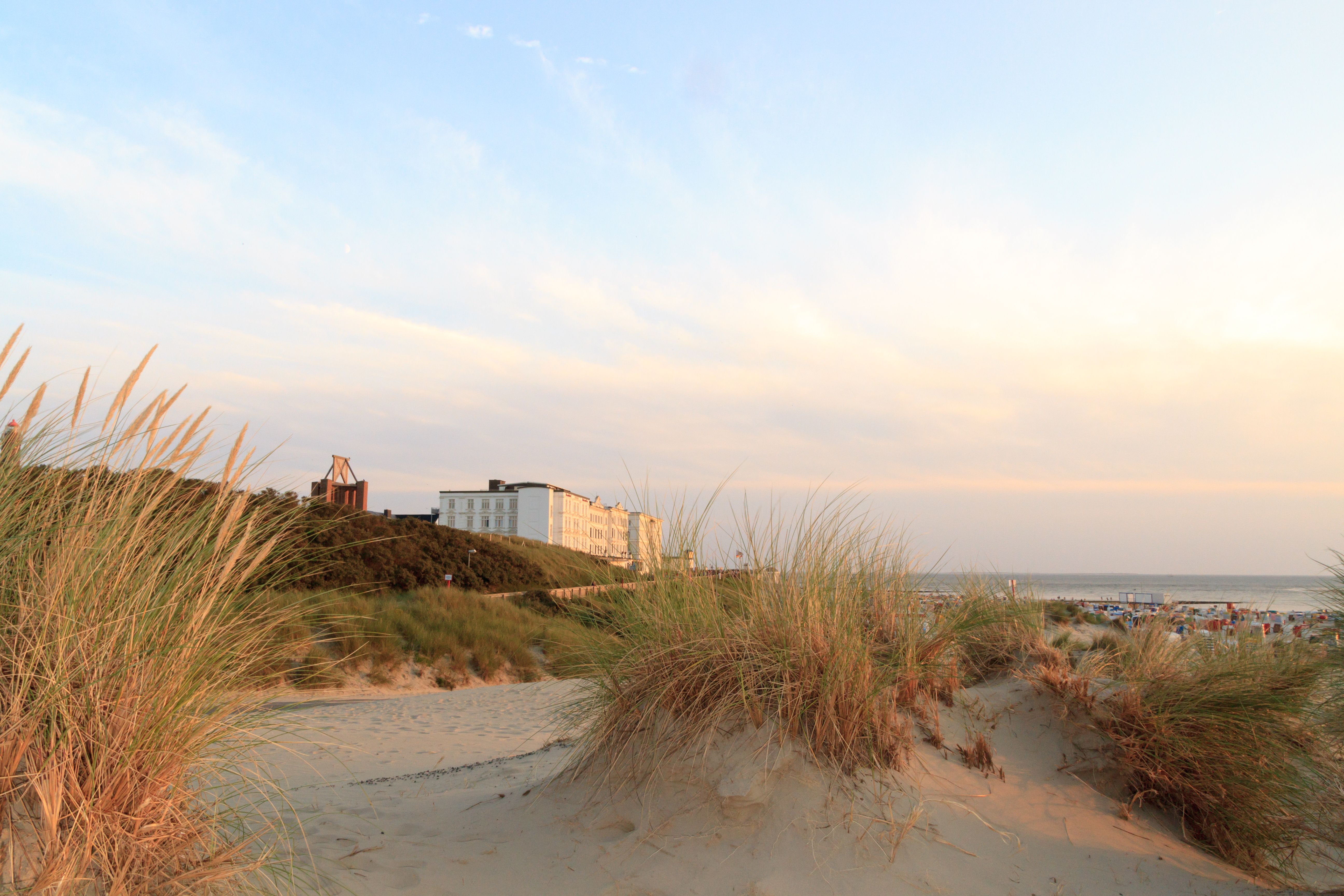 Hauptstrand Borkum